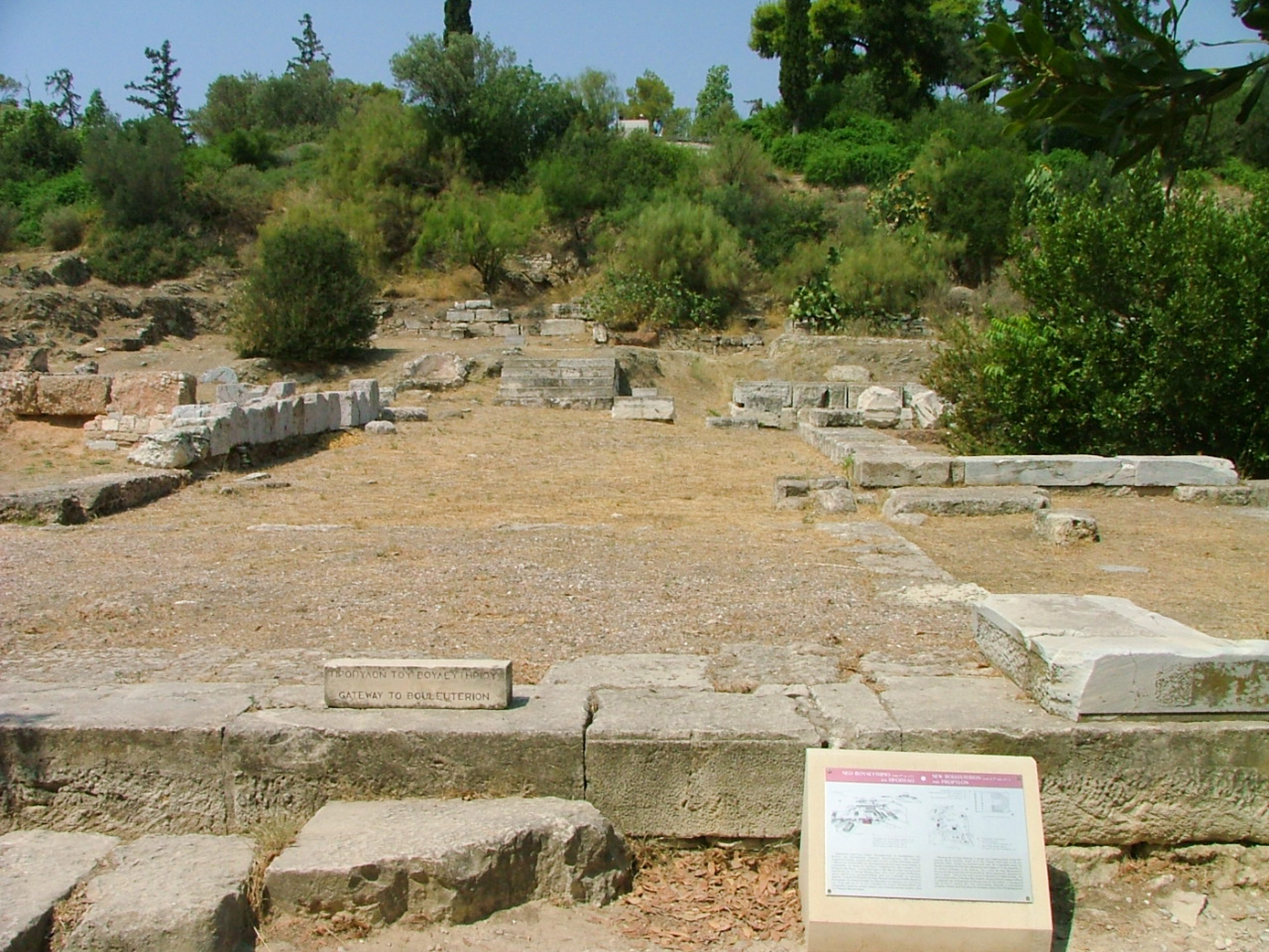 Entrada del Bouleterión del Ágora de Atenas.